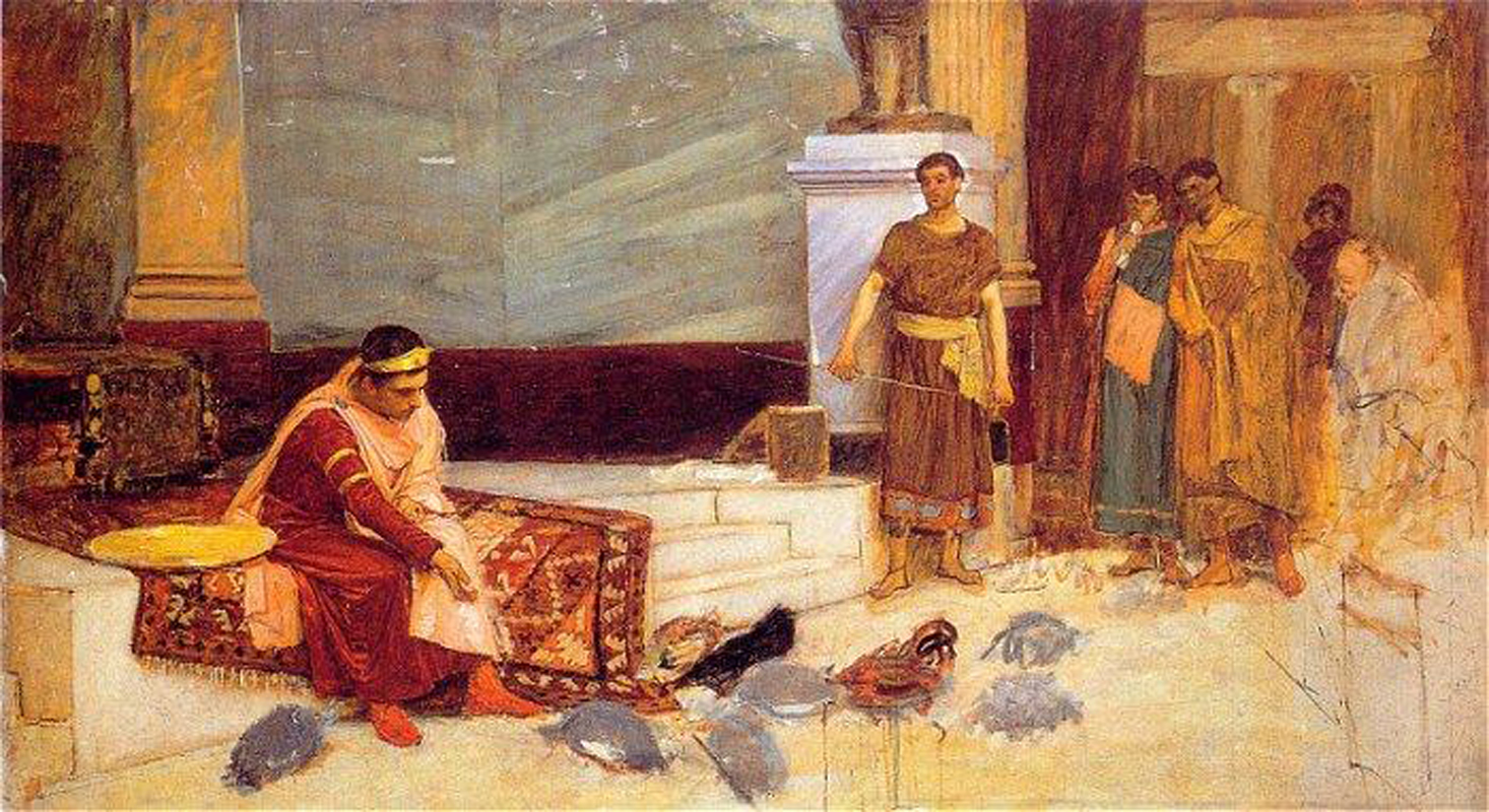 study